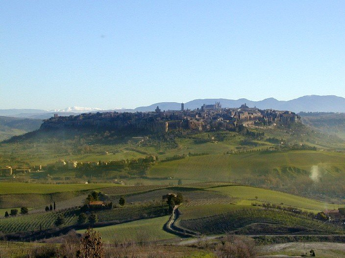 Orvieto vista dalla frazione di Roccaripesena